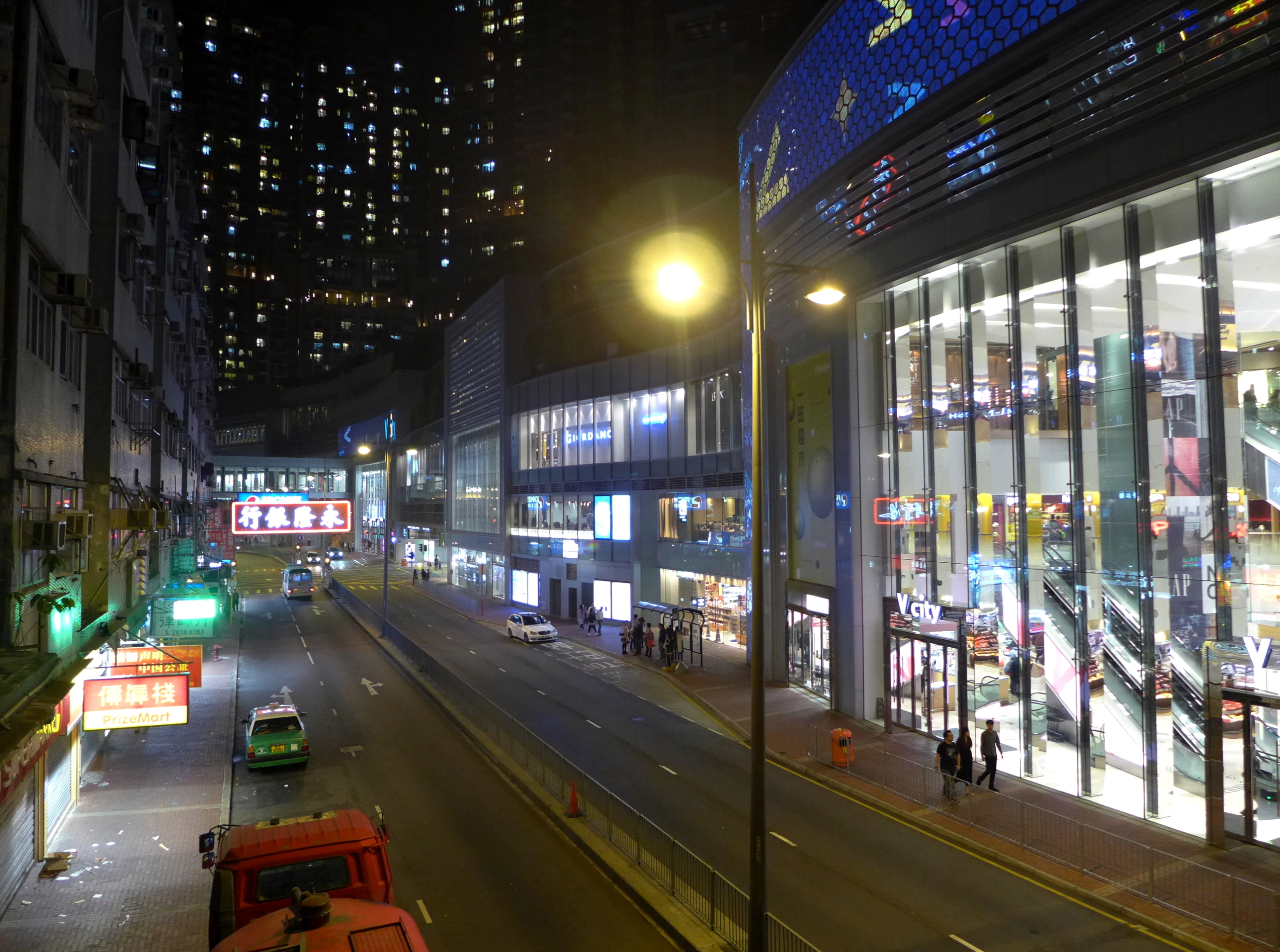 Tuen Mun Heung Sze Wui Road Night View